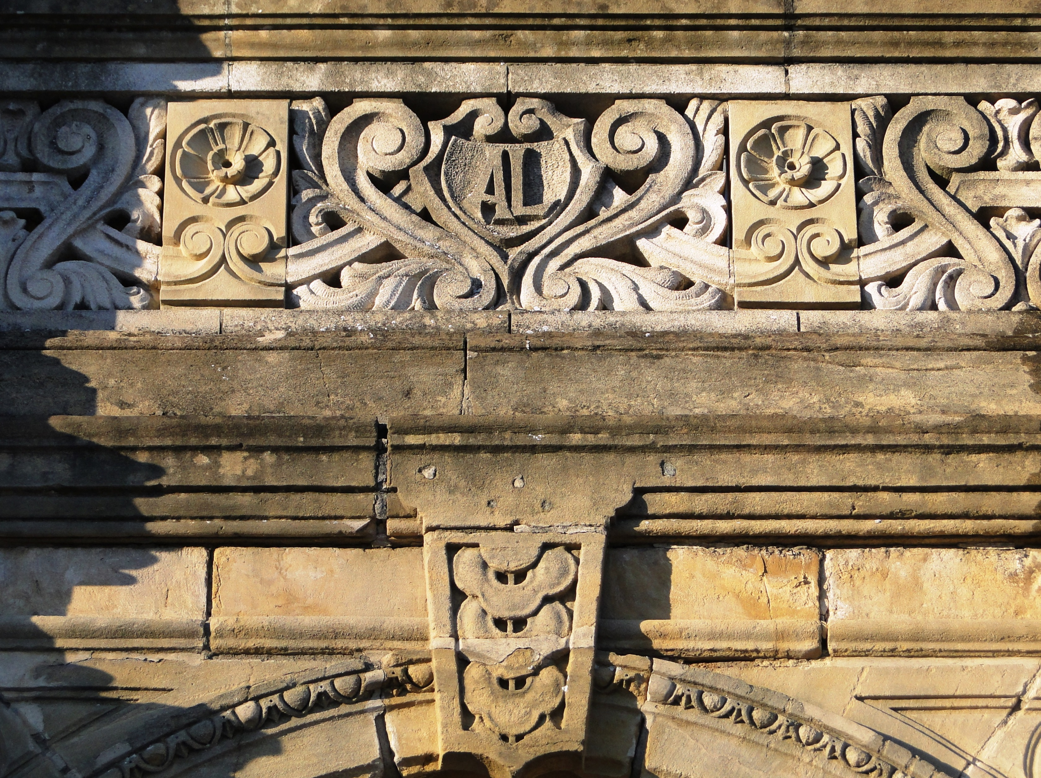 Detail vum Portal vun der fréierer Villa Brincour déi 1969 um bd Royal (Lëtzebuerg) ofgerappt gouf. D'Portal gouf 1973 als Bléckfank un engem Gebai an der rue de Neufchâteau (Bouneweg) neess opgeriicht.